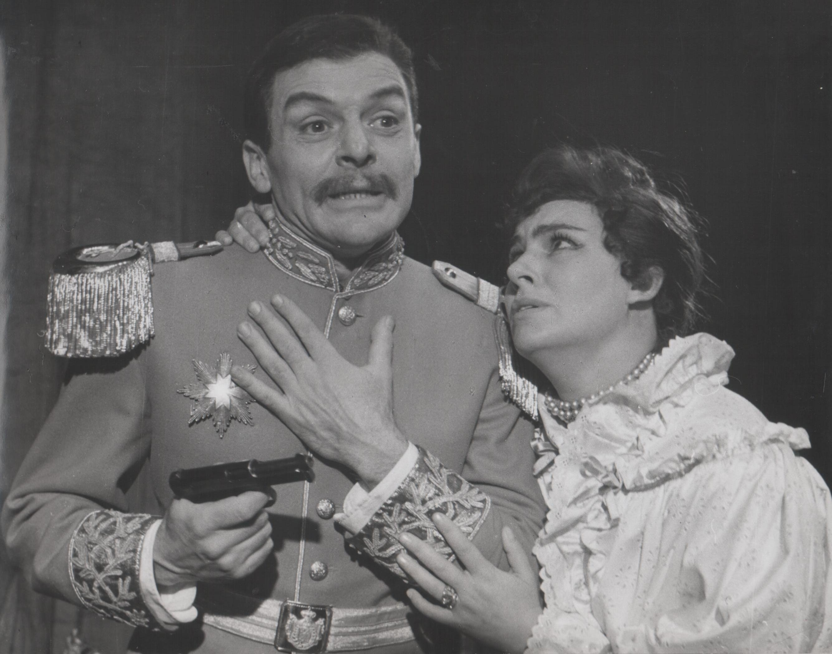 Predstava Konak, Olivera i Rade Markovic, 6. oktobar 1959. Autor fotografije Stevan Kragujević (po odobrenju Tanje Kragujević)